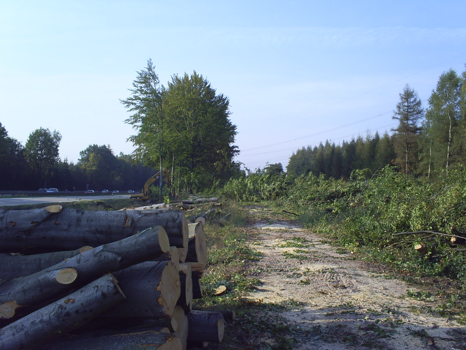 Rodung der Buchen in Abt 525 an der Bundesautobahn 4